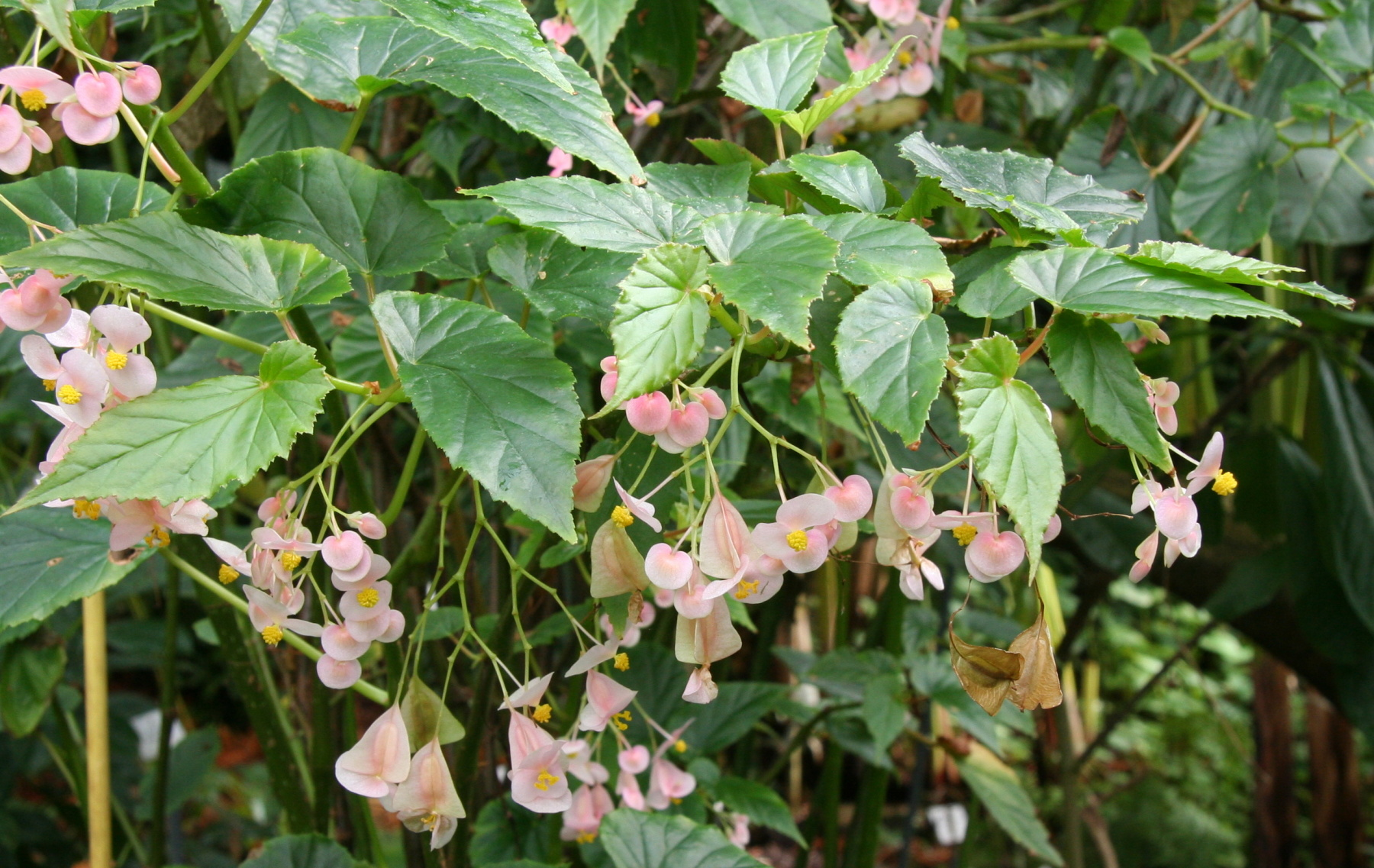 Begonia naumoniensis im Botanischen Garten Dresden